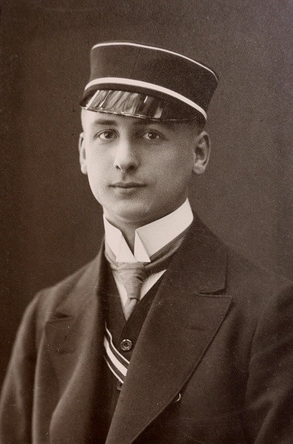 Porträtfotografie von Kurt Schmeisser als Student in Breslau